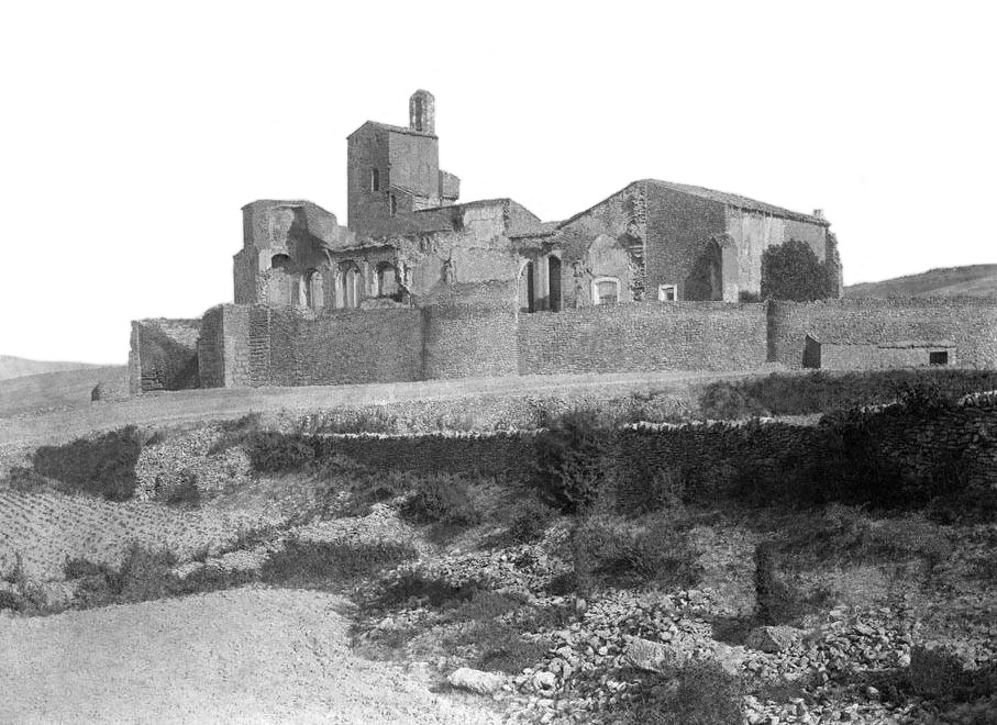 Imatge